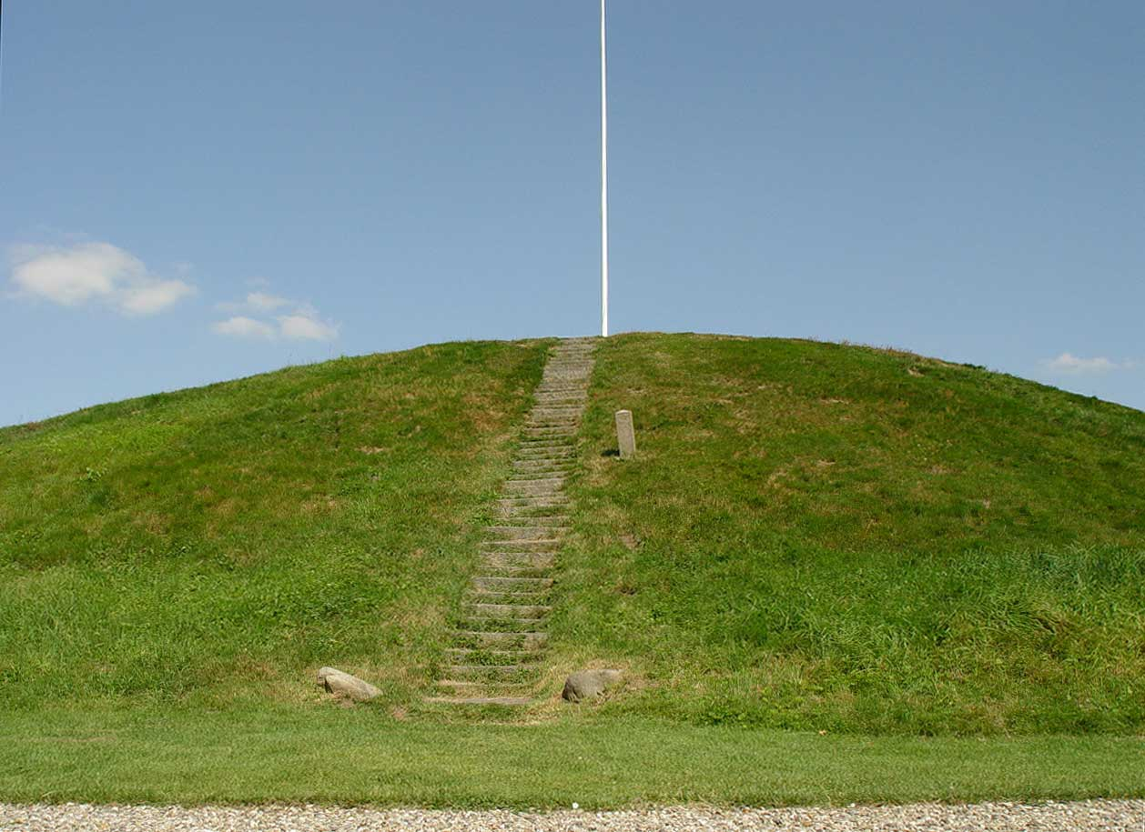 noerdlicher Grabhuegel an der Kirche in Jelling (Blick von der Kirche). Gehoert zum Weltkulturerbe (UNESCO)